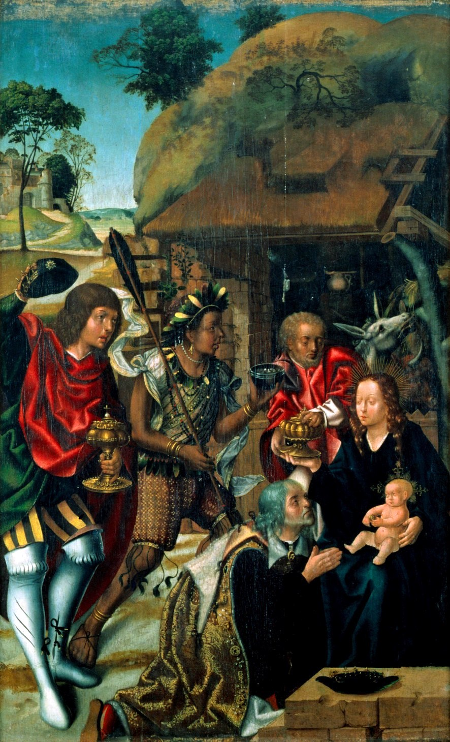 Painel pertencente ao conjunto do antigo Políptico da Sé de Viseu agora no Museu Grão Vasco.